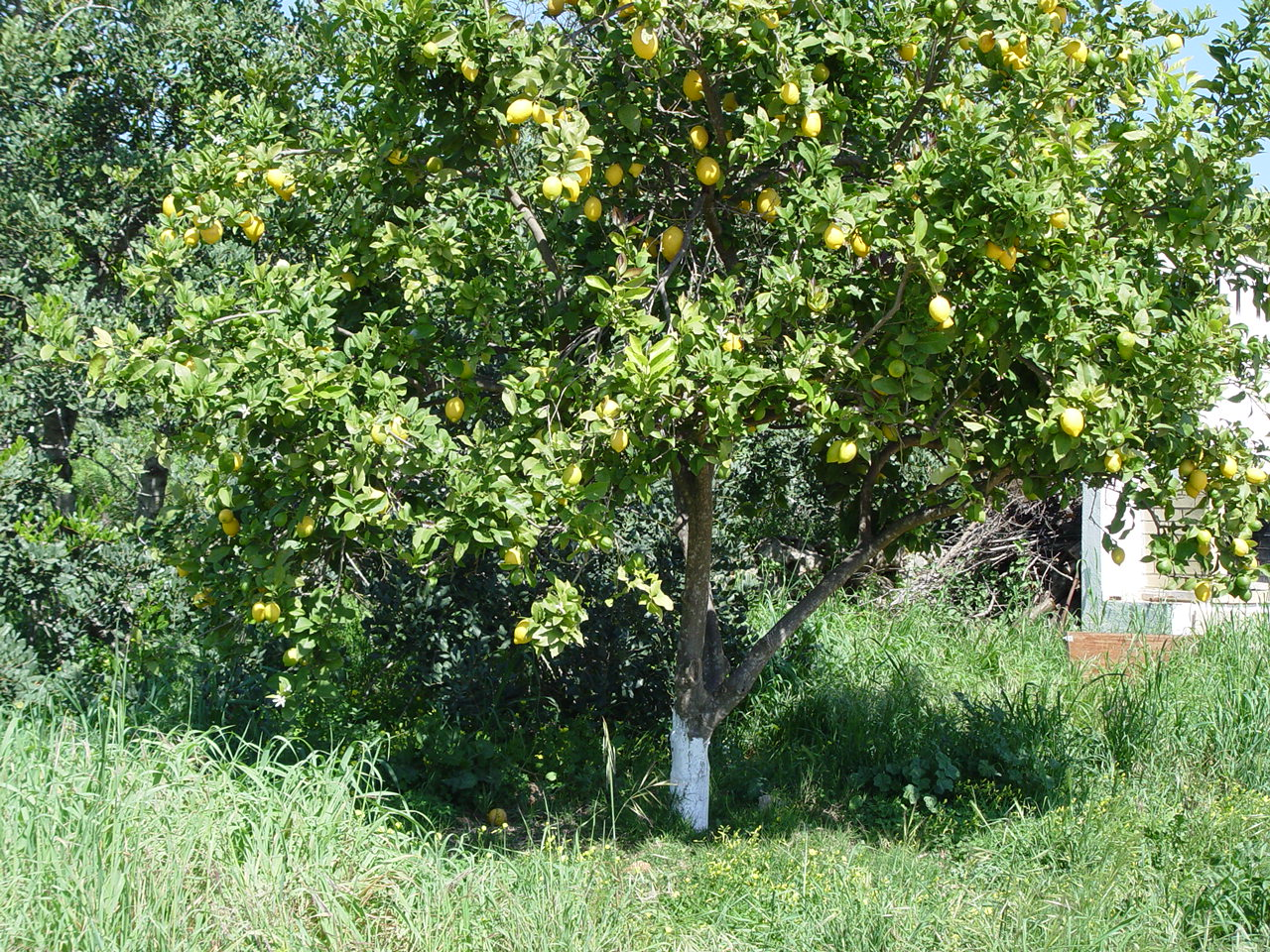 Name Citrus limon Familiy Rutaceae